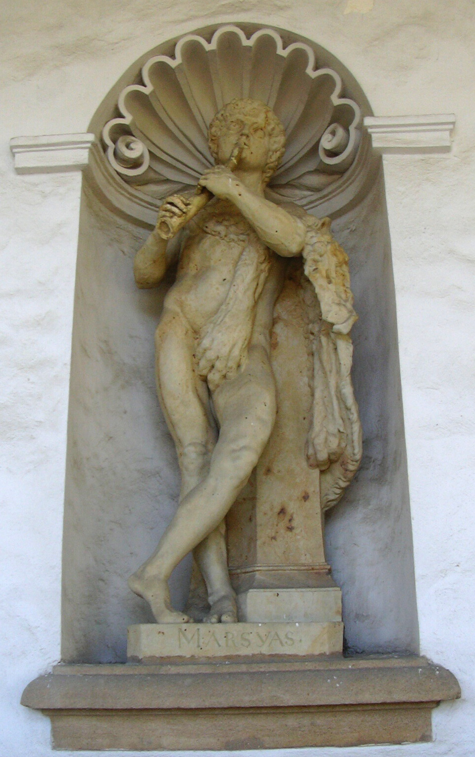 Marsyas - socha Kroměříž Květná zahrada